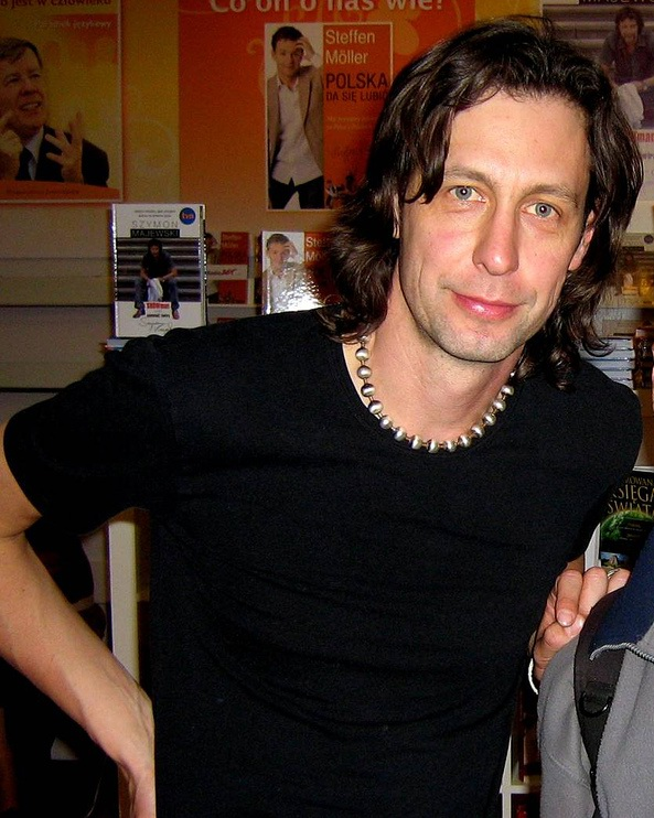 Szymon Majewski (ur. 1 czerwca 1967 w Warszawie) - polski dziennikarz, showman, prezenter radiowy i telewizyjny, satyryk.